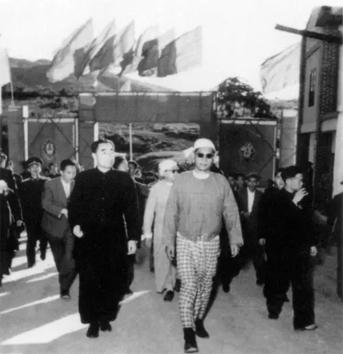 中文（中国大陆）: 1956中缅边民联欢大会，中缅总理周恩来和吴巴瑞步入会场